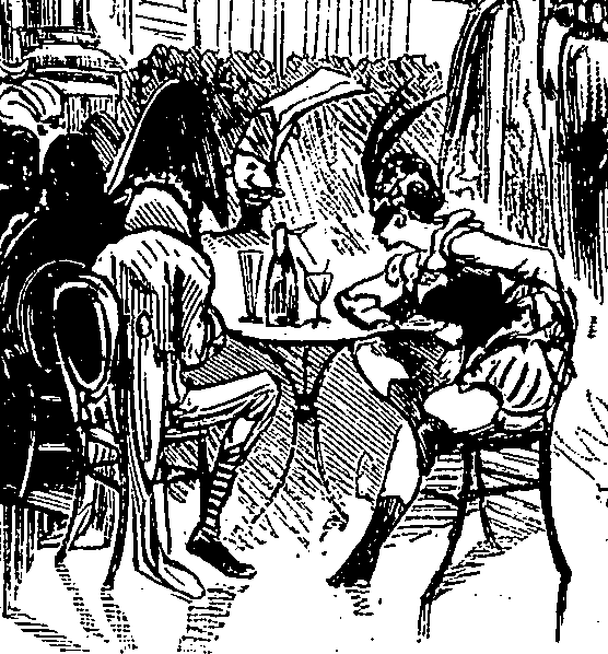 Une table au bal de l'Opéra donné pour la Mi-Carême le jeudi 20 mars 1879.